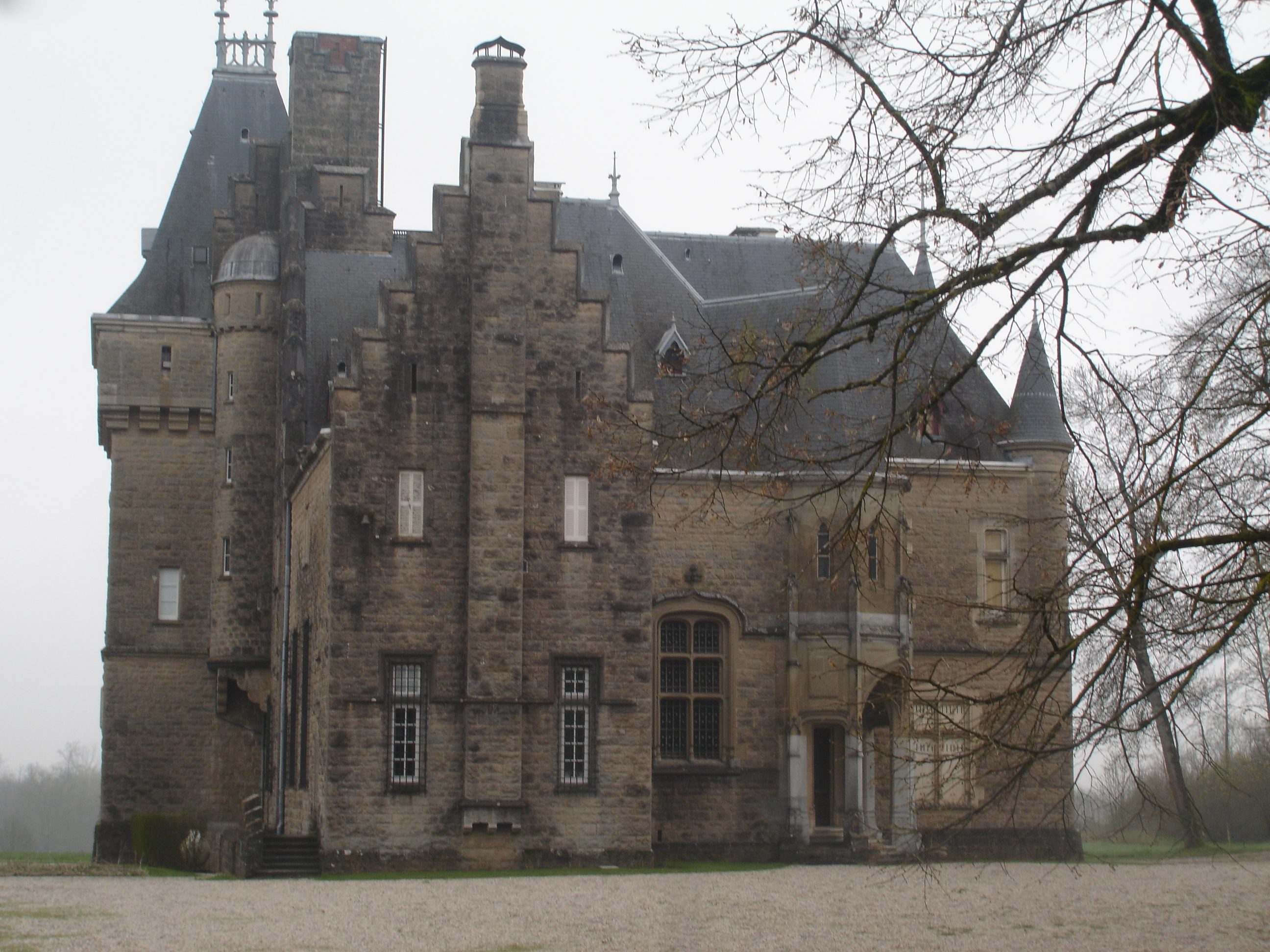 Courtenay (38) : le château de Courtenay-Lançin